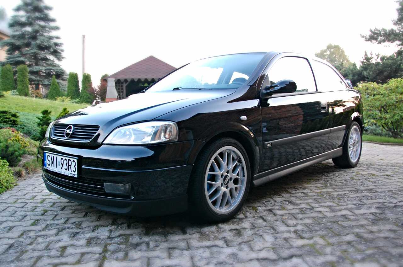 ASTRA G OPC1 PRZÓD